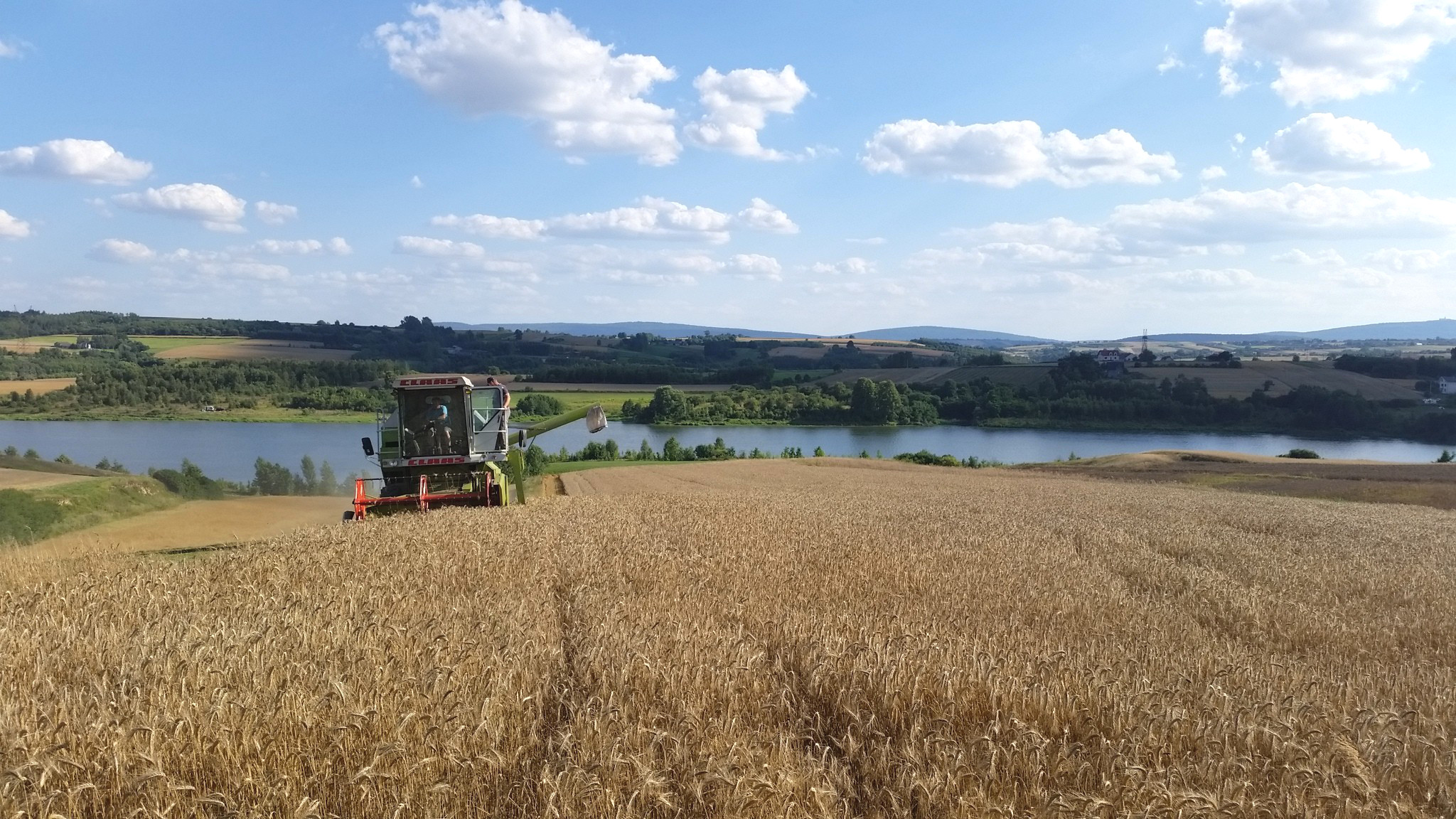 Żniwa w Kałkowie